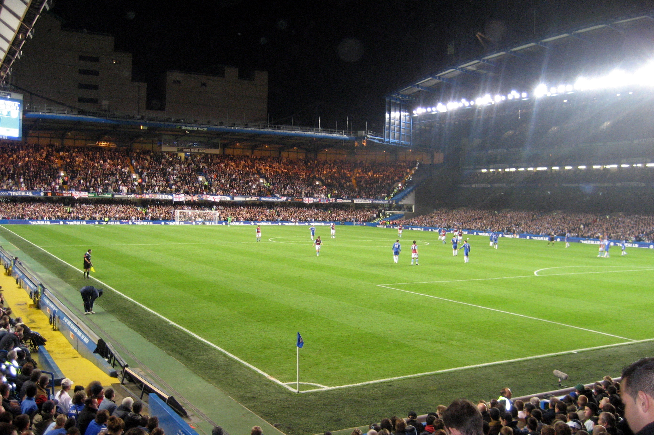 Inside Stamford Bridge.